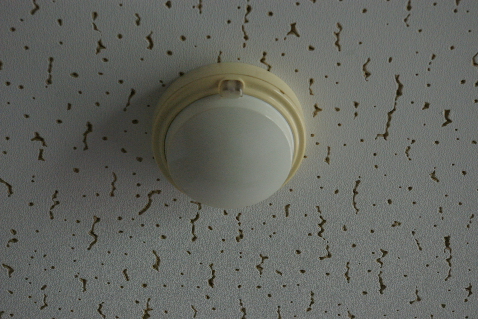 Rate-of-rise sopt type detector/Тепловой дифференциальный извещатель